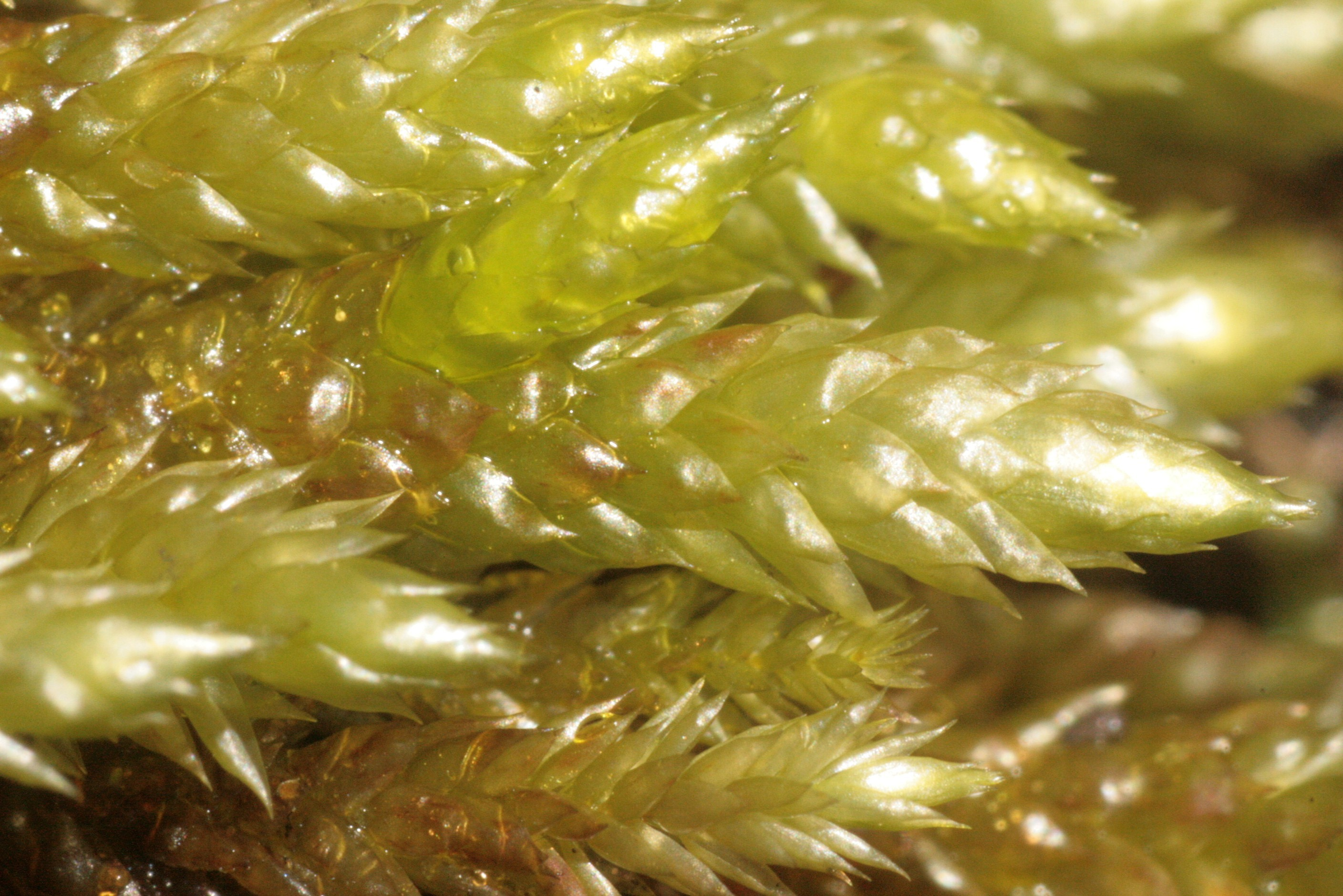 Isothecium alopecuroides, Umgebung Hollenstein an der Ybbs, Niederösterreich, Austria